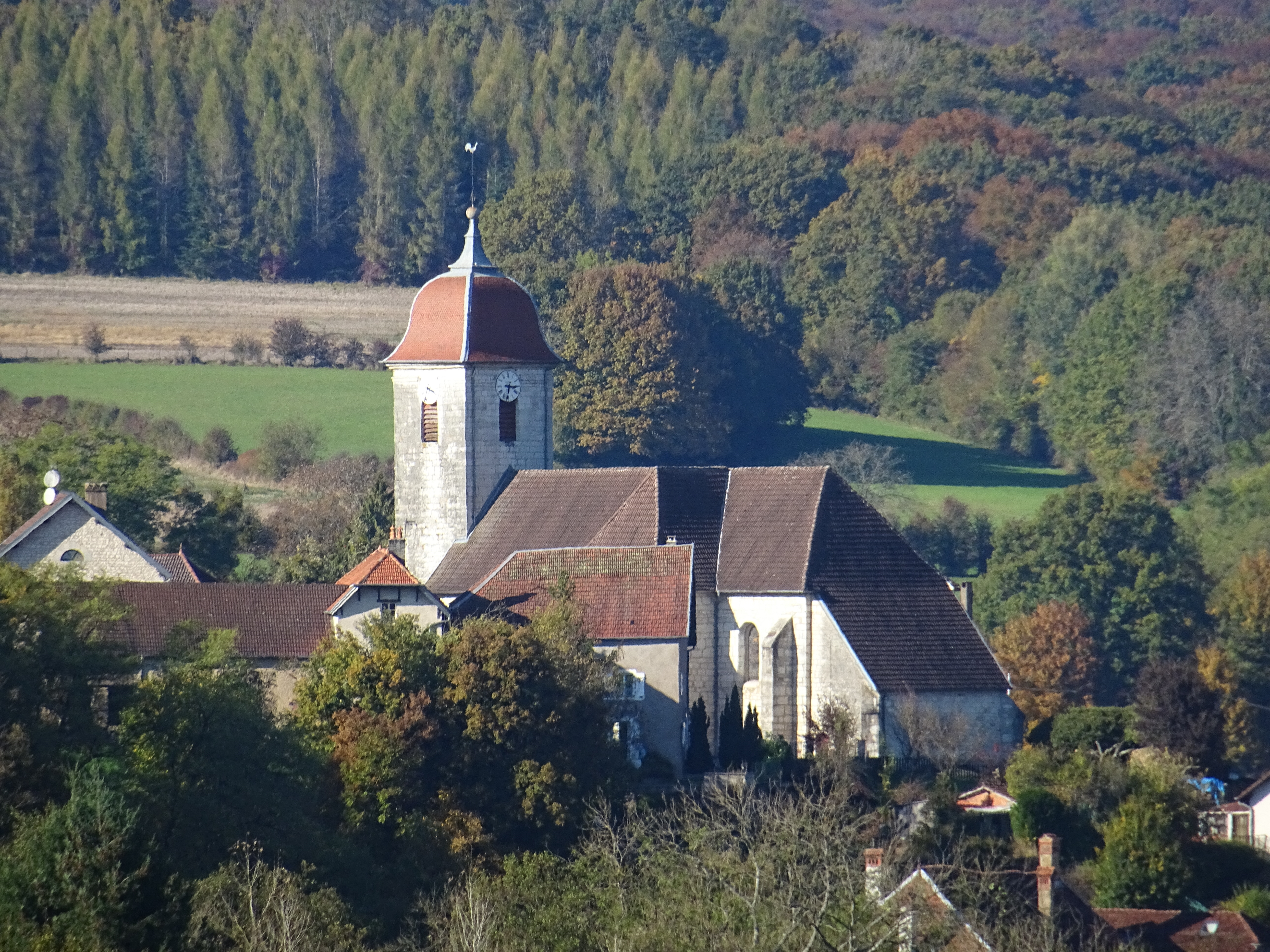 L'église Saint-Gengoul de Chassey-lès-Montbozon.